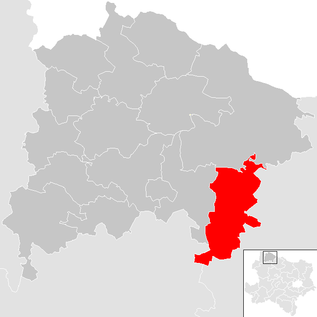 Bezirk Waidhofen an der Thaya